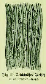 Fig. 33. Trichinöses Fleisch. in natürlicher Größe.